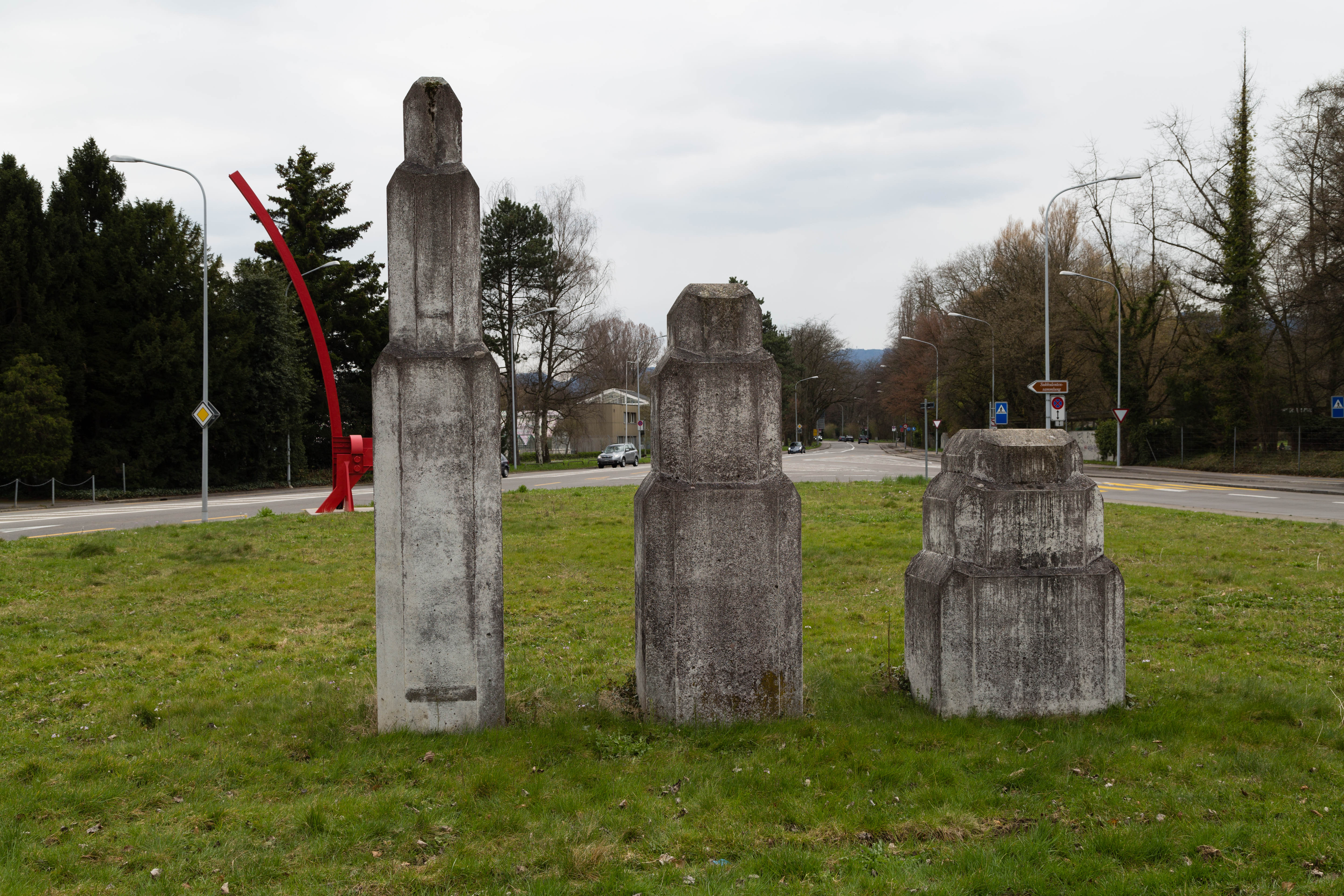 In der Grünanlage Alfred-Escher-Strasse (Kreuzung Mytenquai/Alfred-Escher-Strasse) in Zürich Ende, befindet sich diese Skulpurengruppe von Peter Storrer. Das Werk trägt den Titel "Drei Obelisken". Bei der Jahresangabe 1988 ist unklar ob es sich um das Herstellungs- oder Aufstelljahr handelt. Hintergrund ist die rote Skulptur "Grosse Giraffe" von Bernhard Luginbüehl von 1969 erkennbar.